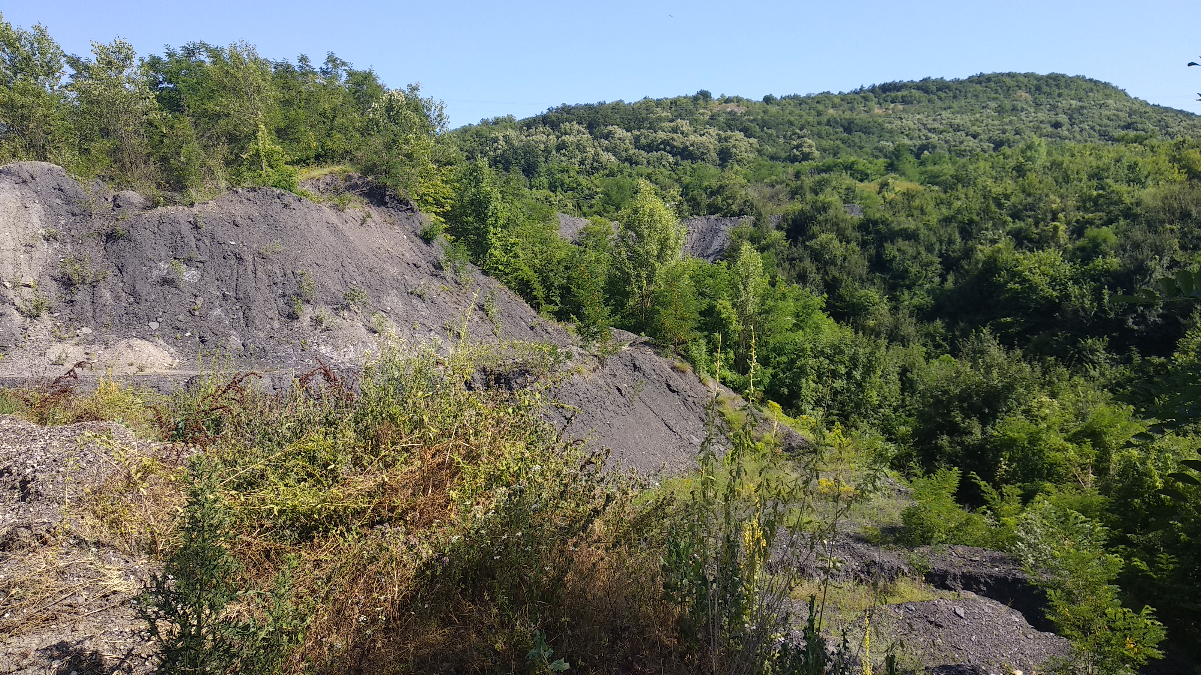 Планина Вршка Чука у близини града Зајечара у Србији